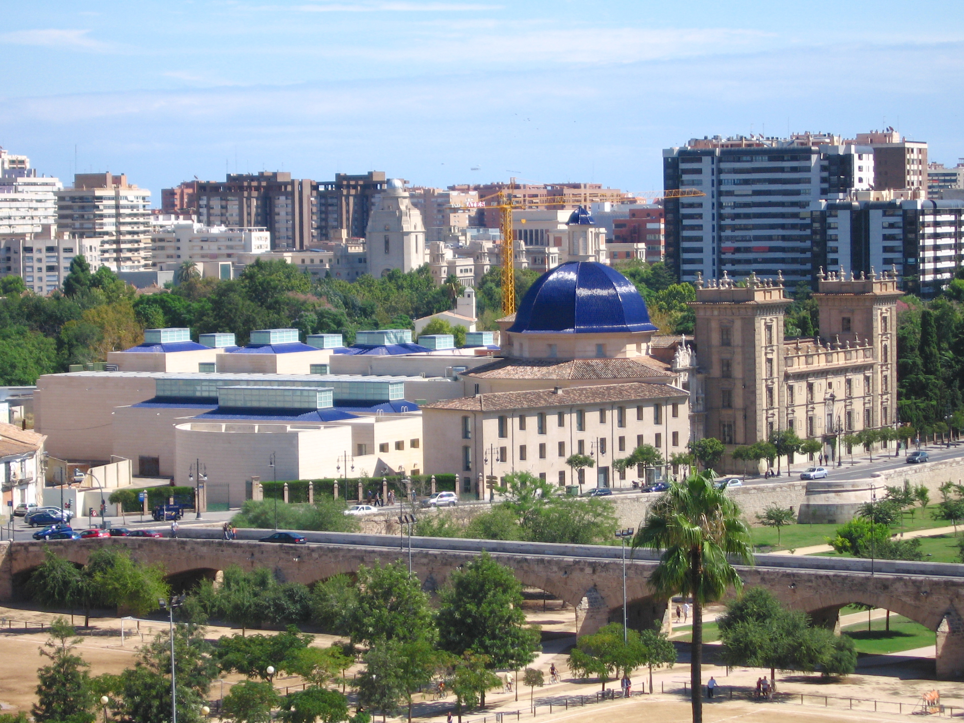 vista Museu Pius V (València)